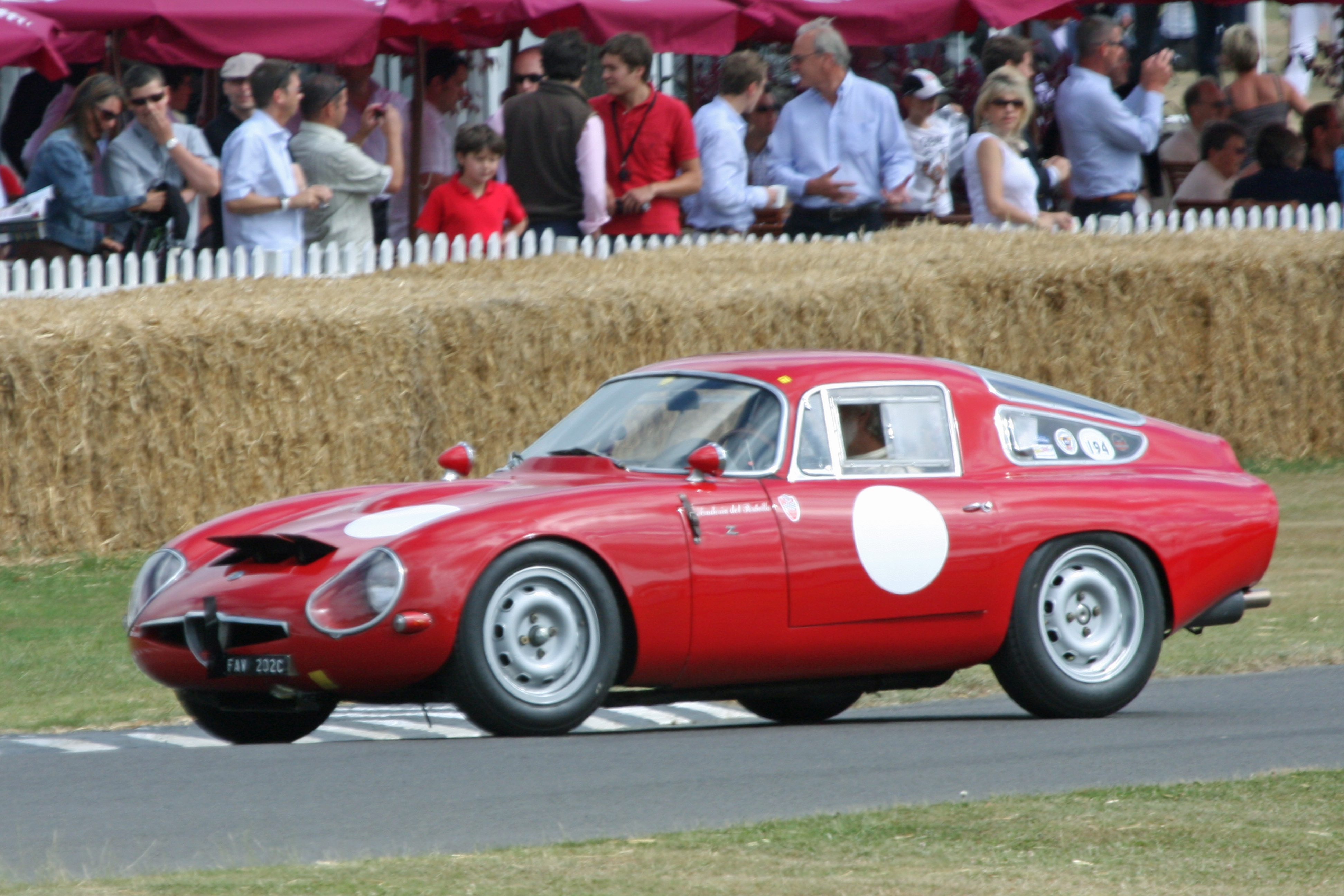 1964 Alfa Romeo Giulia TZ-1